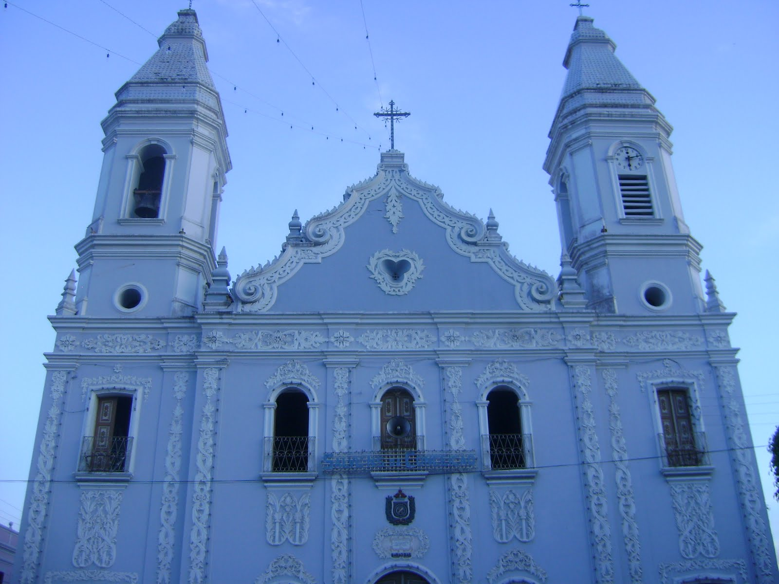 Fachada d Igreja Matriz de Nossa Senhora da Conceição, em Água Branca, Alagoas. foi construída no ano de 1871, pelo Capitão-mor, Joaquim Antônio de Siqueira Torres , Barão de Água Branca.